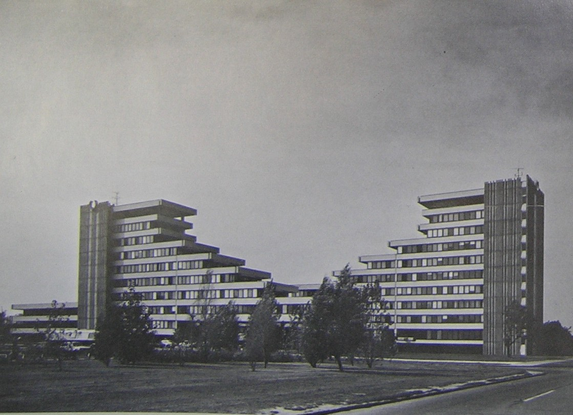 Budova Kerametal, autor: Ľ. Jendreják, 1968, 1973